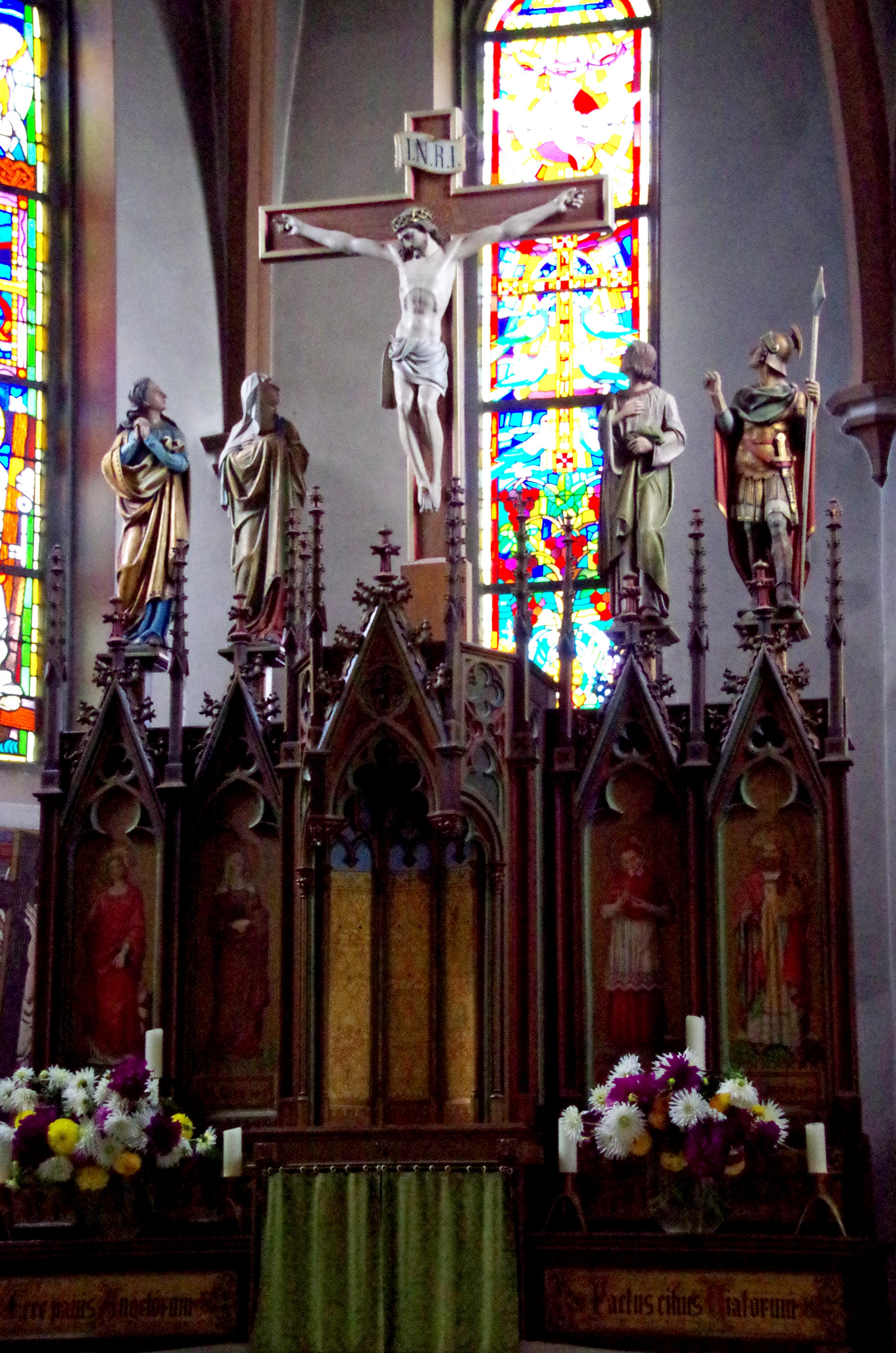 St. Peter (Berg), Hochaltar